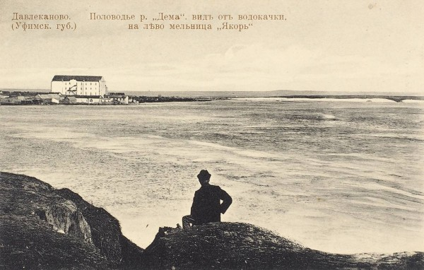 Давлеканово. Половодье на реке Дёма. Вид от водокачки (налево мельница "Якорь") 1905 – 1915, Россия, Башкортостан, Давлекановский район